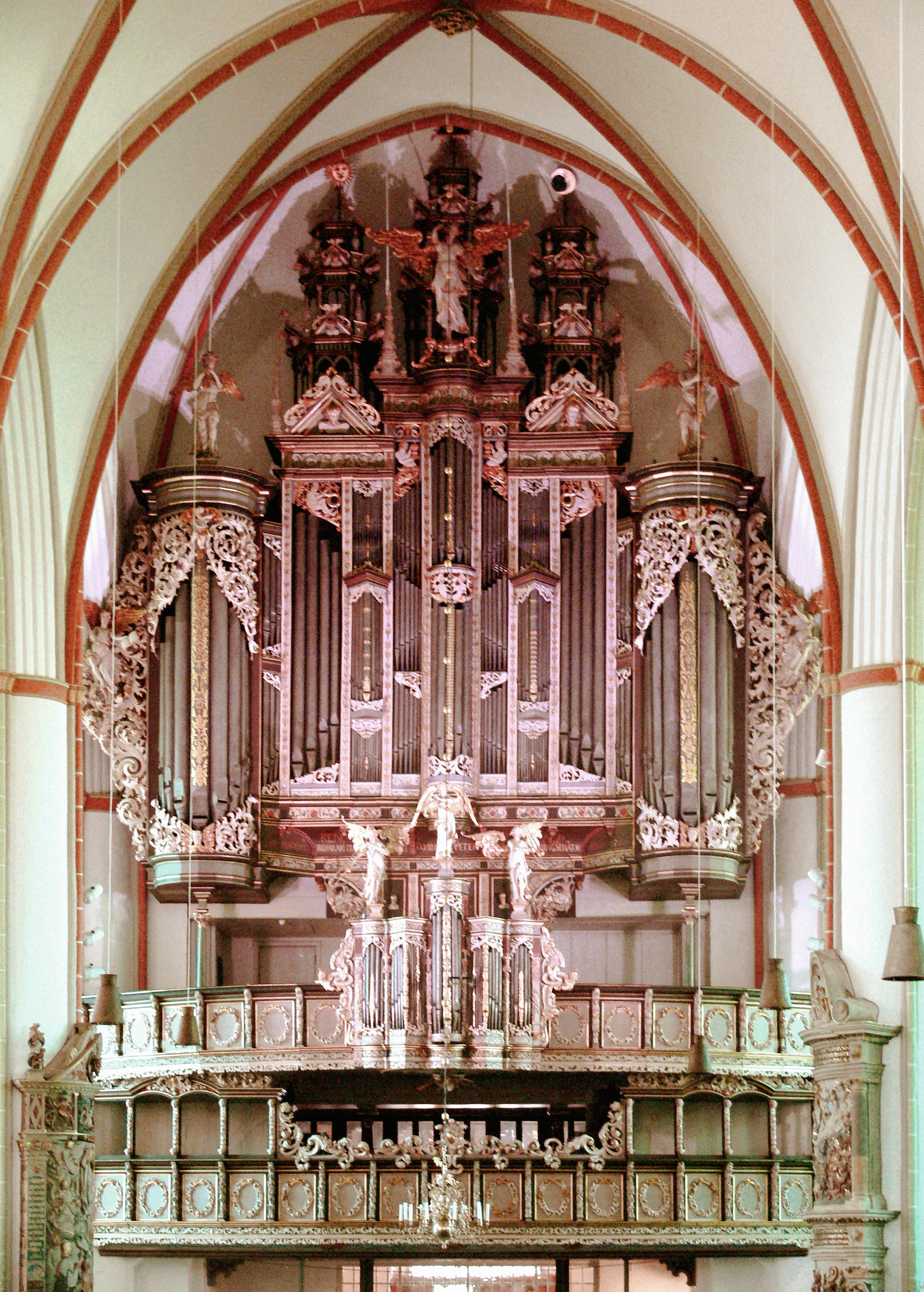 Lüneburg, Kirche St. Johannis Orgel; Mittelteil von Hendrik Niehoff und Jasper Johanesn aus s'Hertogenbosch 1551–1553, Pedaltürme von Matthias Dropa 1712–1714